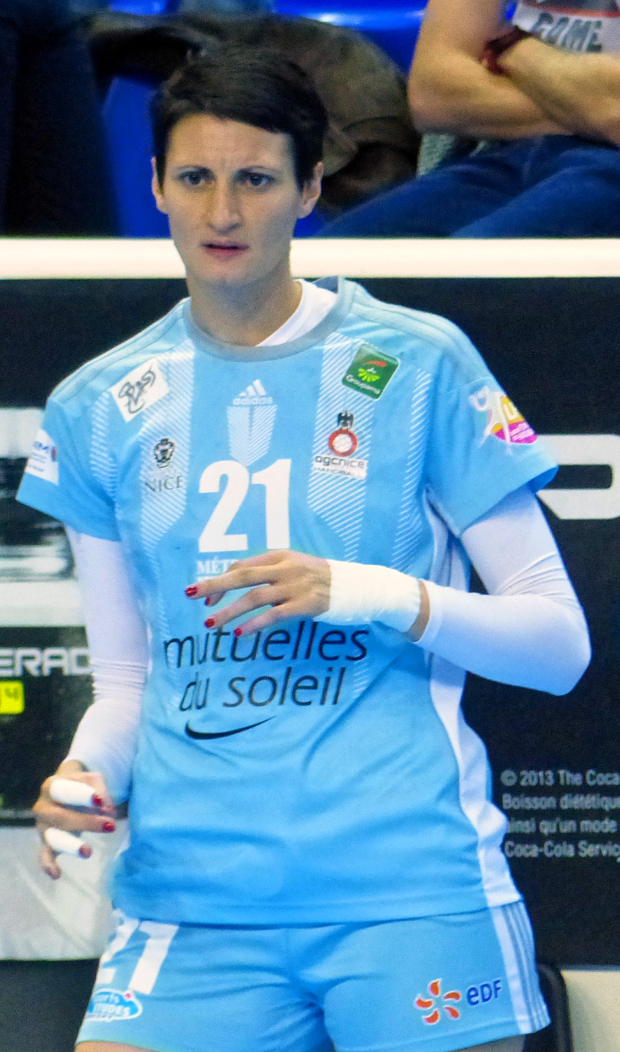 Rencontre Issy PAris Hand / OGC Nice. A Coubertin, le 26 septembre 2014.